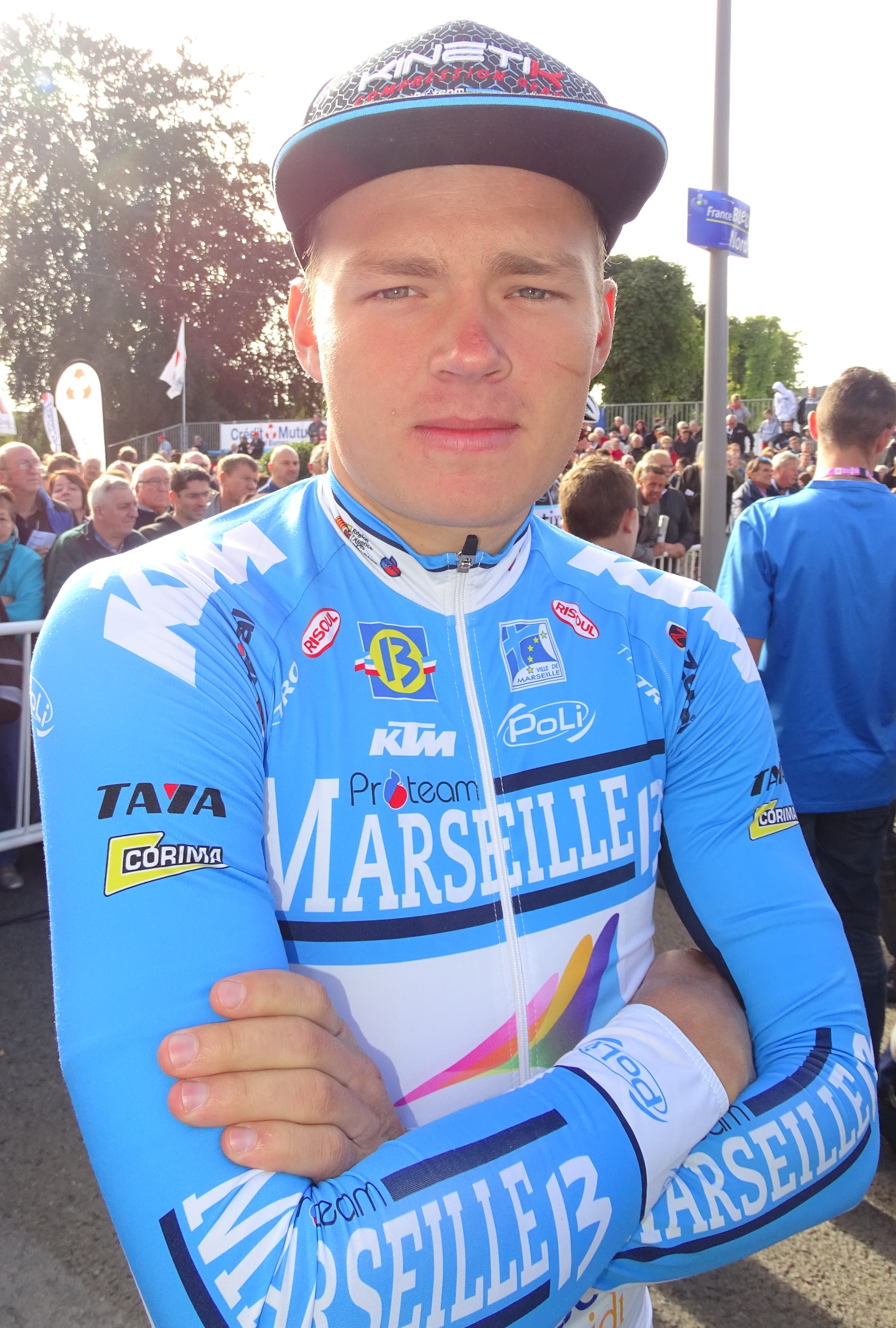 Reportage réalisé le dimanche 6 septembre à l'occasion du départ et de l'arrivée du Grand Prix de Fourmies 2015 à Fourmies, Nord-Pas-de-Calais, France.